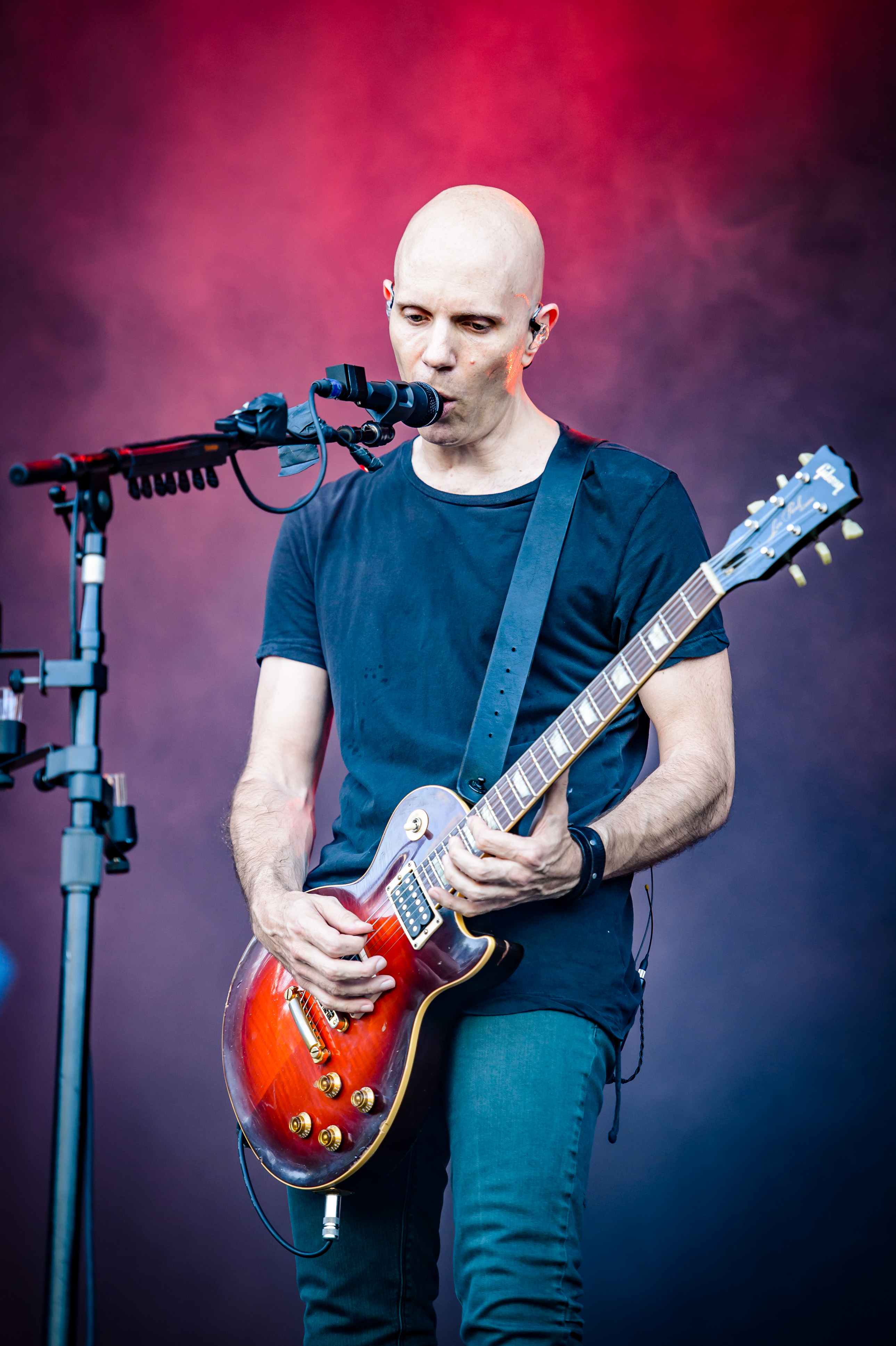 'Rock im Park 2018; Zeppelinfeld Nürnberg': 'A Perfect Circle'